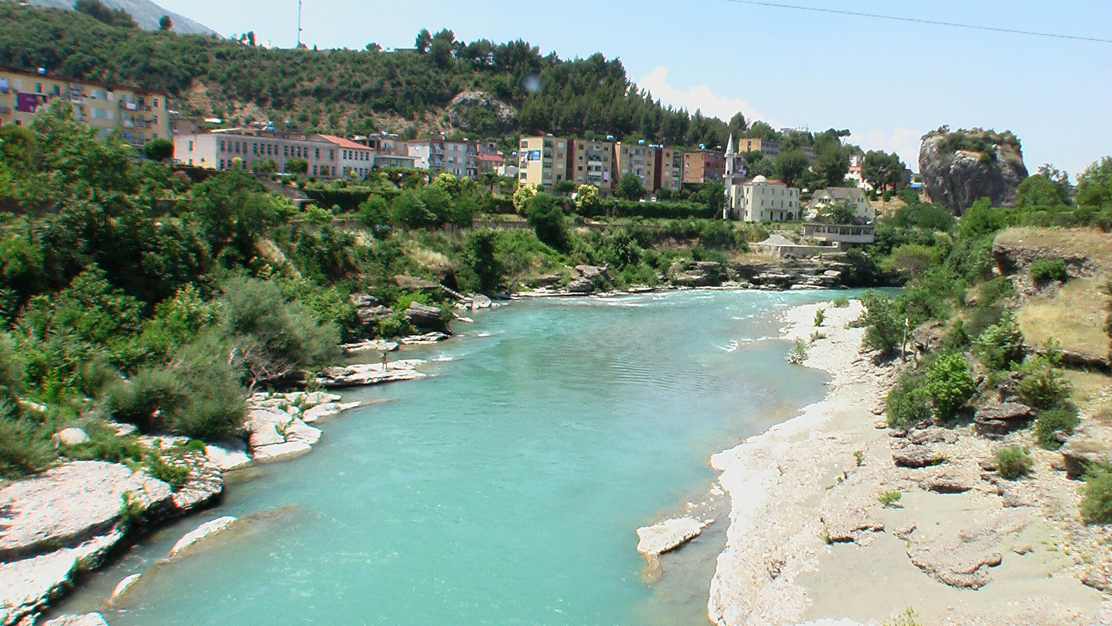 PërmetAmFlussVjosai